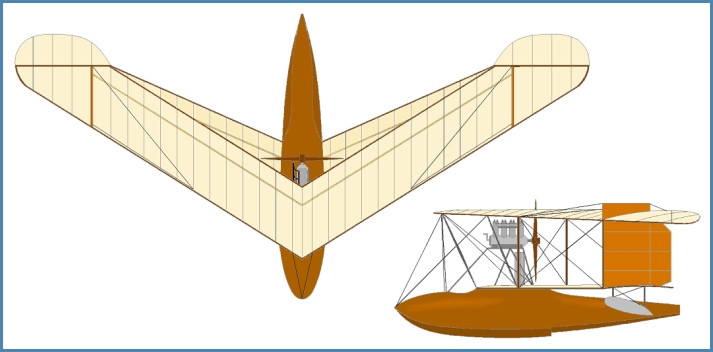 Burgess BDF